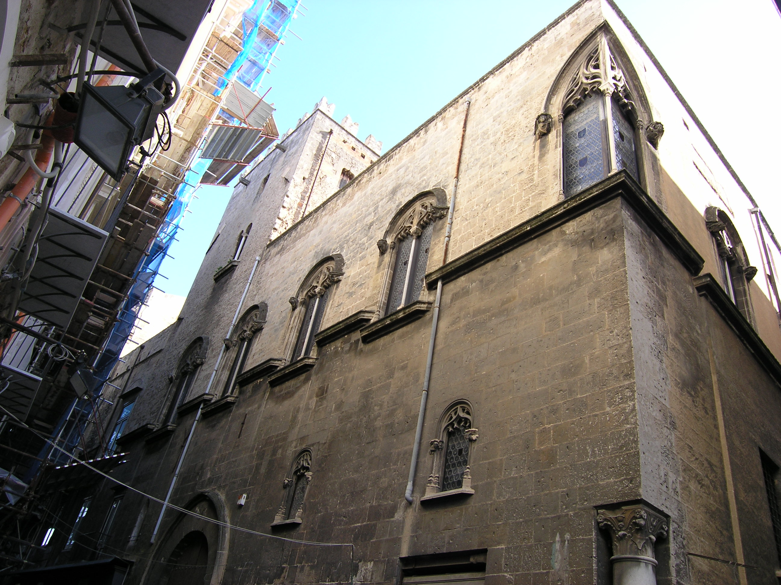 Sicilianu: Palazzu Alliata di Pietratagliata ex Termini - s. XV